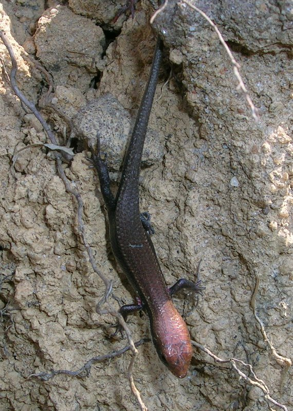 Ristella skink from Dandeli, India